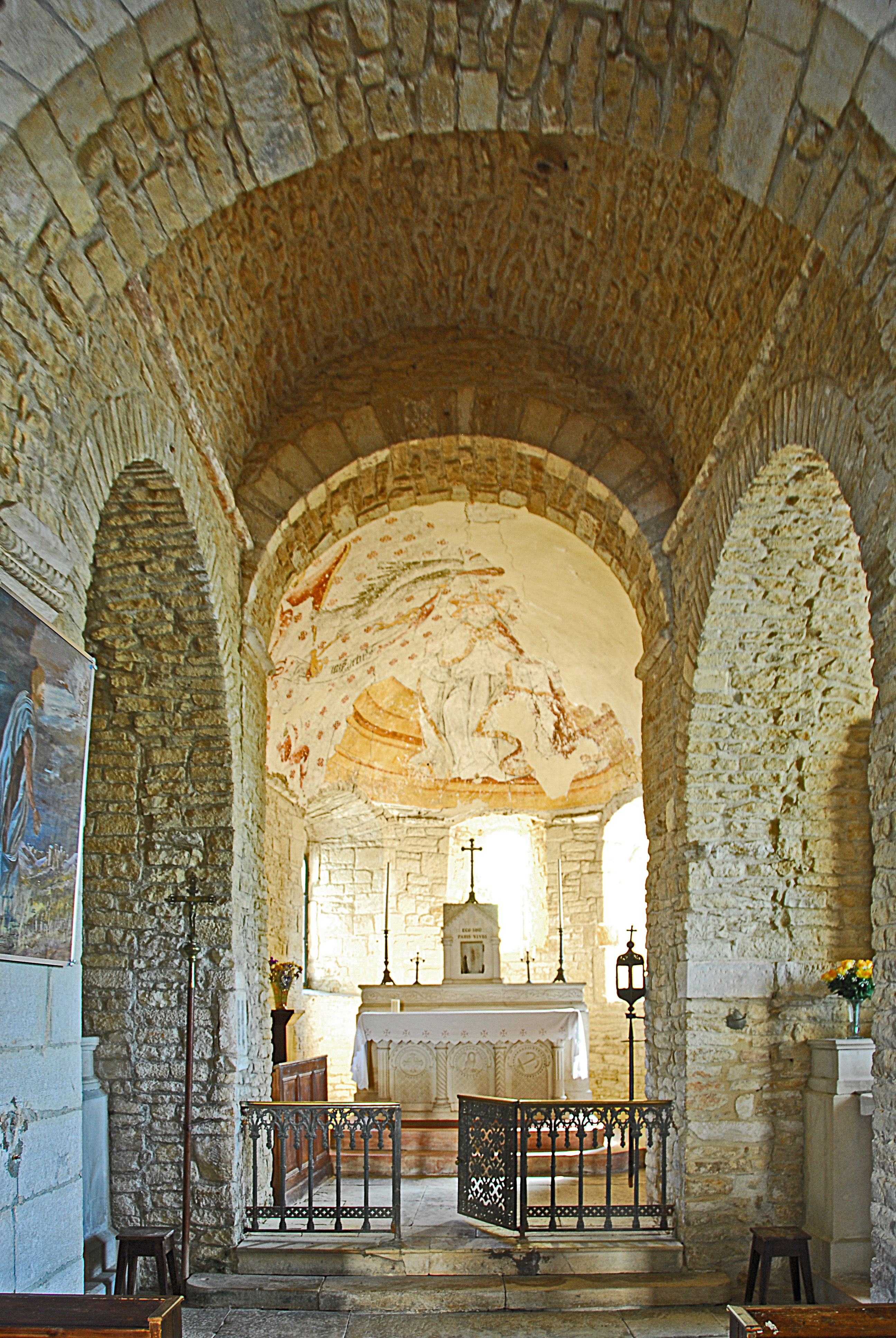 St-Bathélémy, Farges, Vierung und Chor